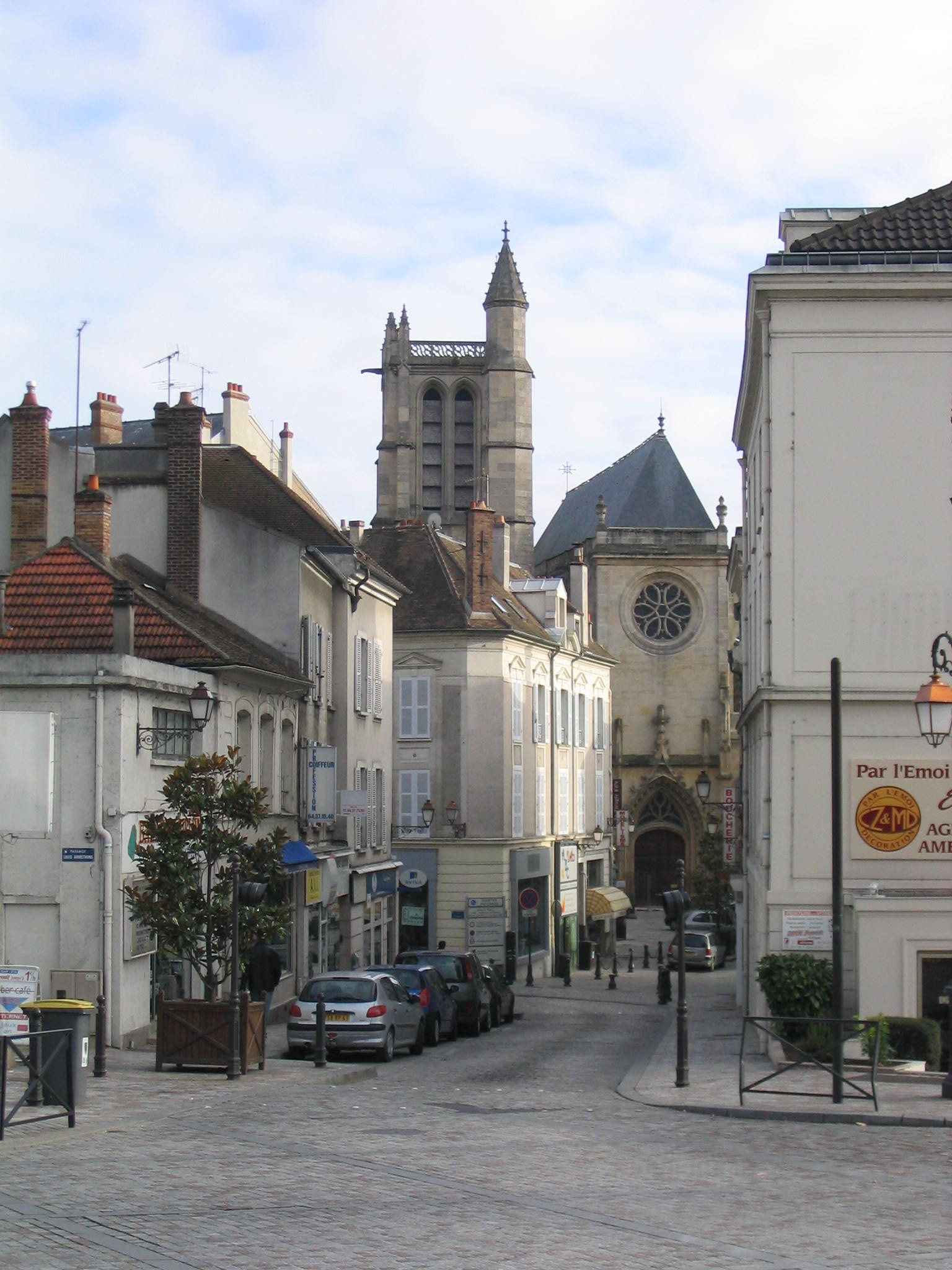 La rue du miroir, dans le quartier Saint-Aspais à Melun (Seine-et-Marne, France).